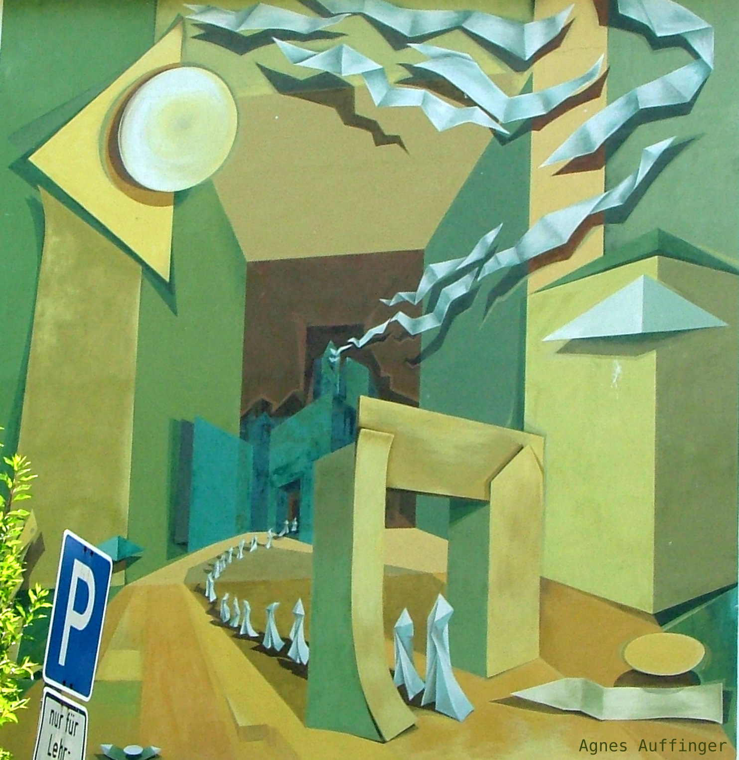 Eingang und Ausgang